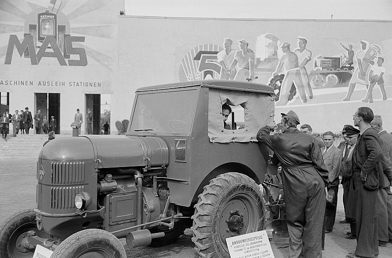 Original image description from the Deutsche Fotothek IFA-Traktor mit Anbauwechselpflug